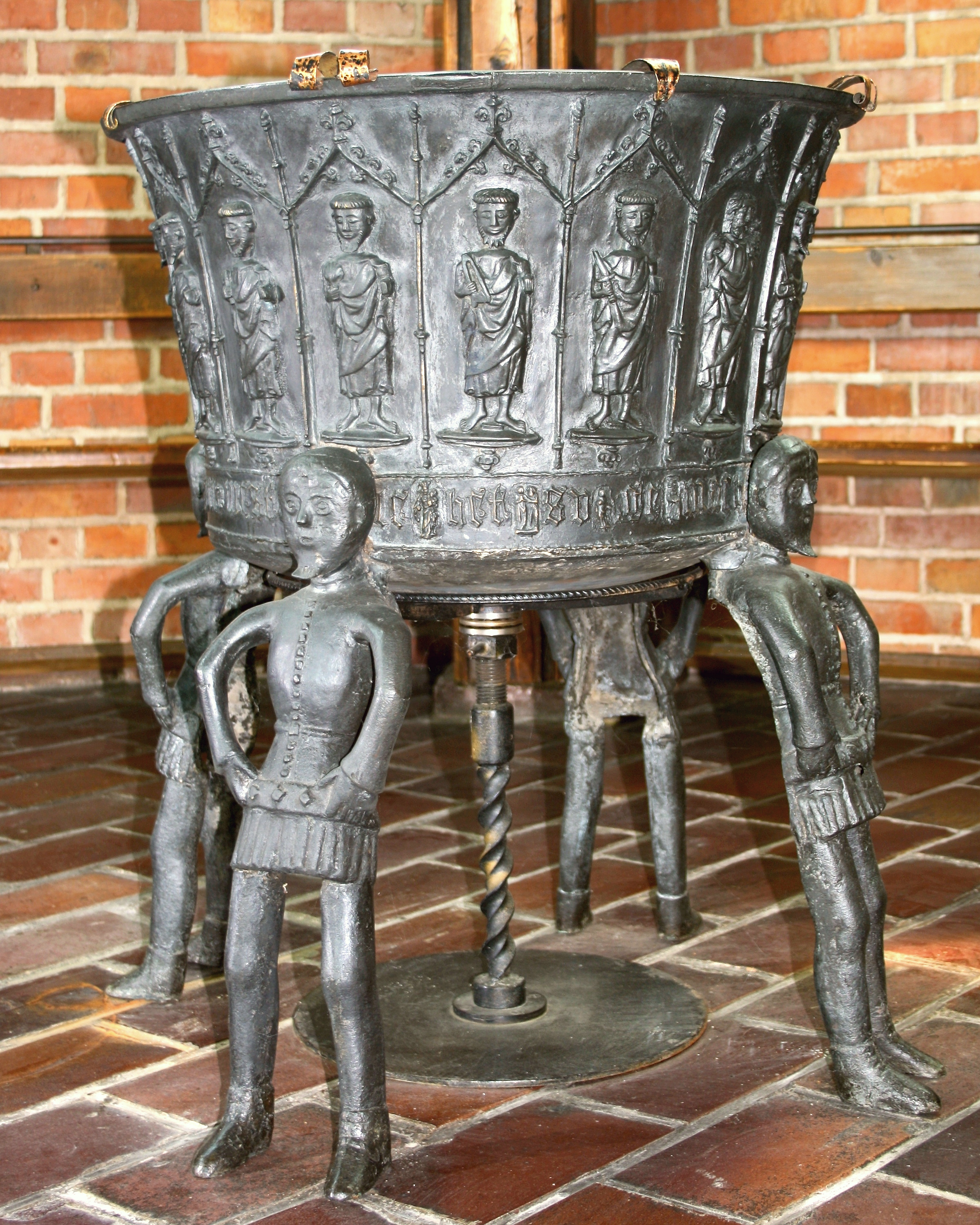 Bronzetaufbecken (1429) von St. Petri, heute in der Justus-Jonas-Kirche, Nordhausen, Thüringen.